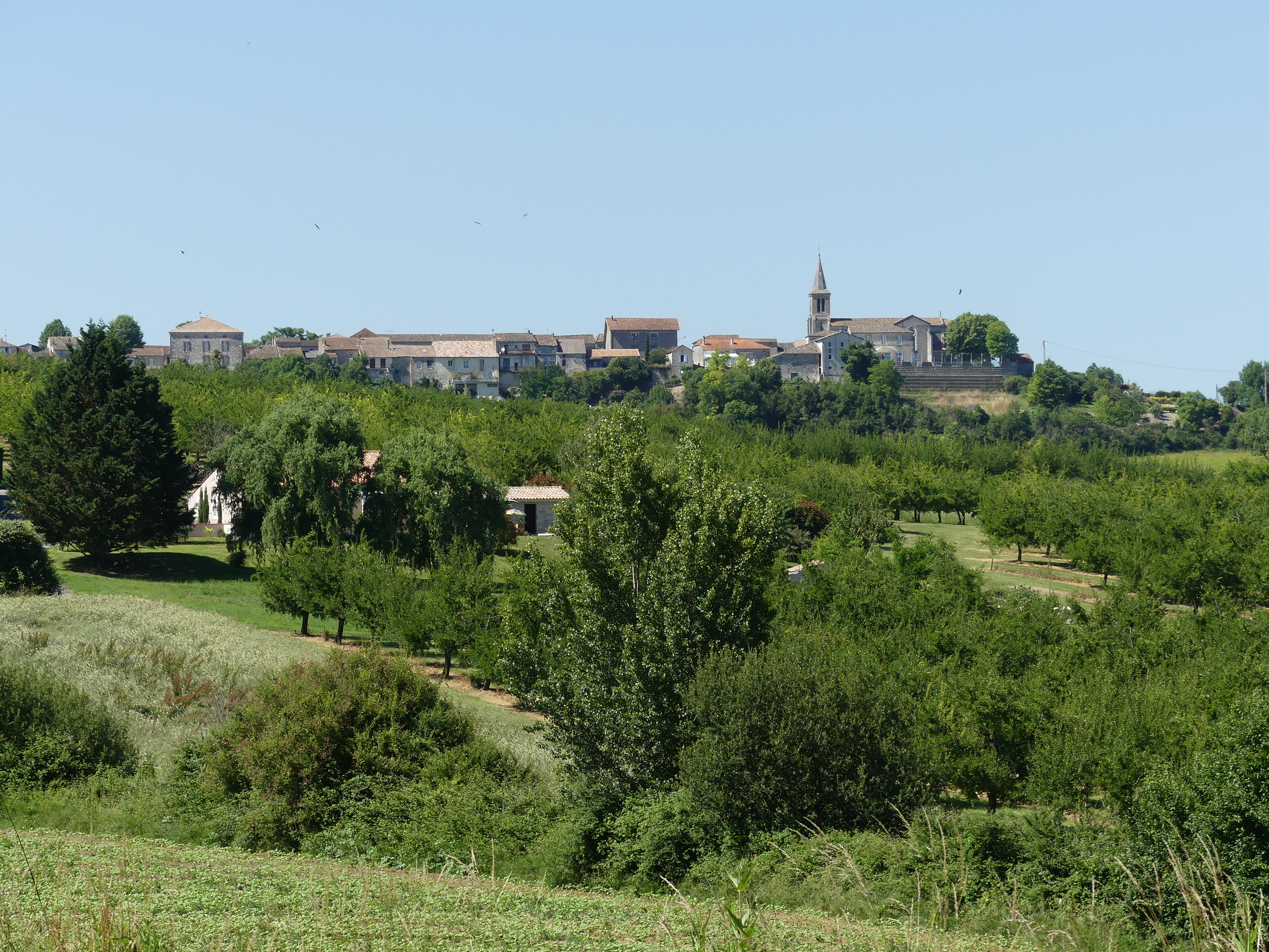 Le bourg de Castelnaud-de-Gratecambe, Lot-et-Garonne, France.